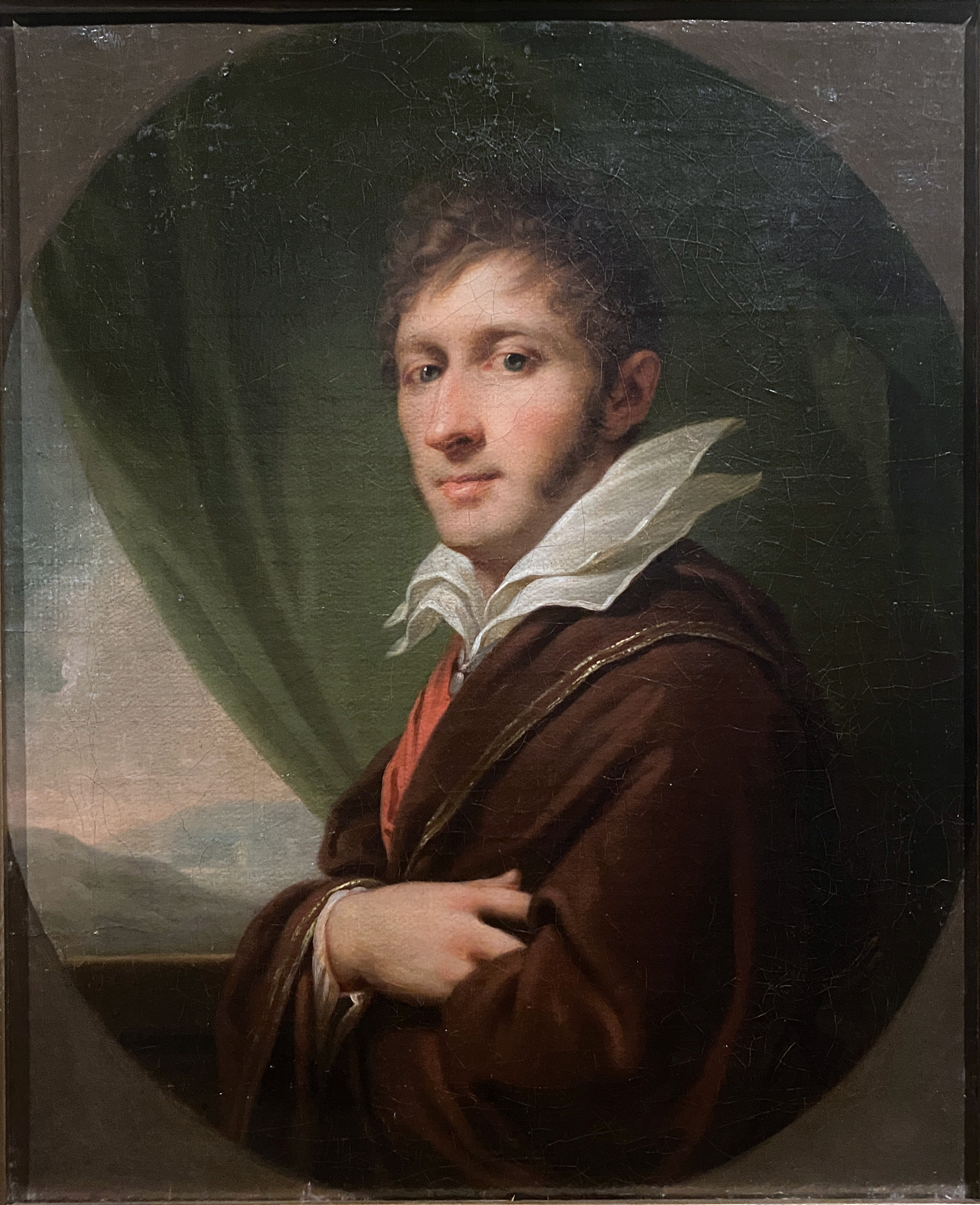 Belarusian (Taraškievica orthography): Партрэт Францішка Сапегі (Francišak Sapieha)